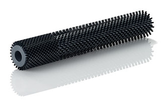 Rund- und Walzenbürsten sind sehr vielseitig und wirtschaftlich, deshalb ideal für viele Fertigungsbereiche und Produkte der Industrie, bei denen es nicht auf sehr hohe Umdrehungszahlen ankommt und keine starken mechanischen Belastungen auf die Bürste einwirken.